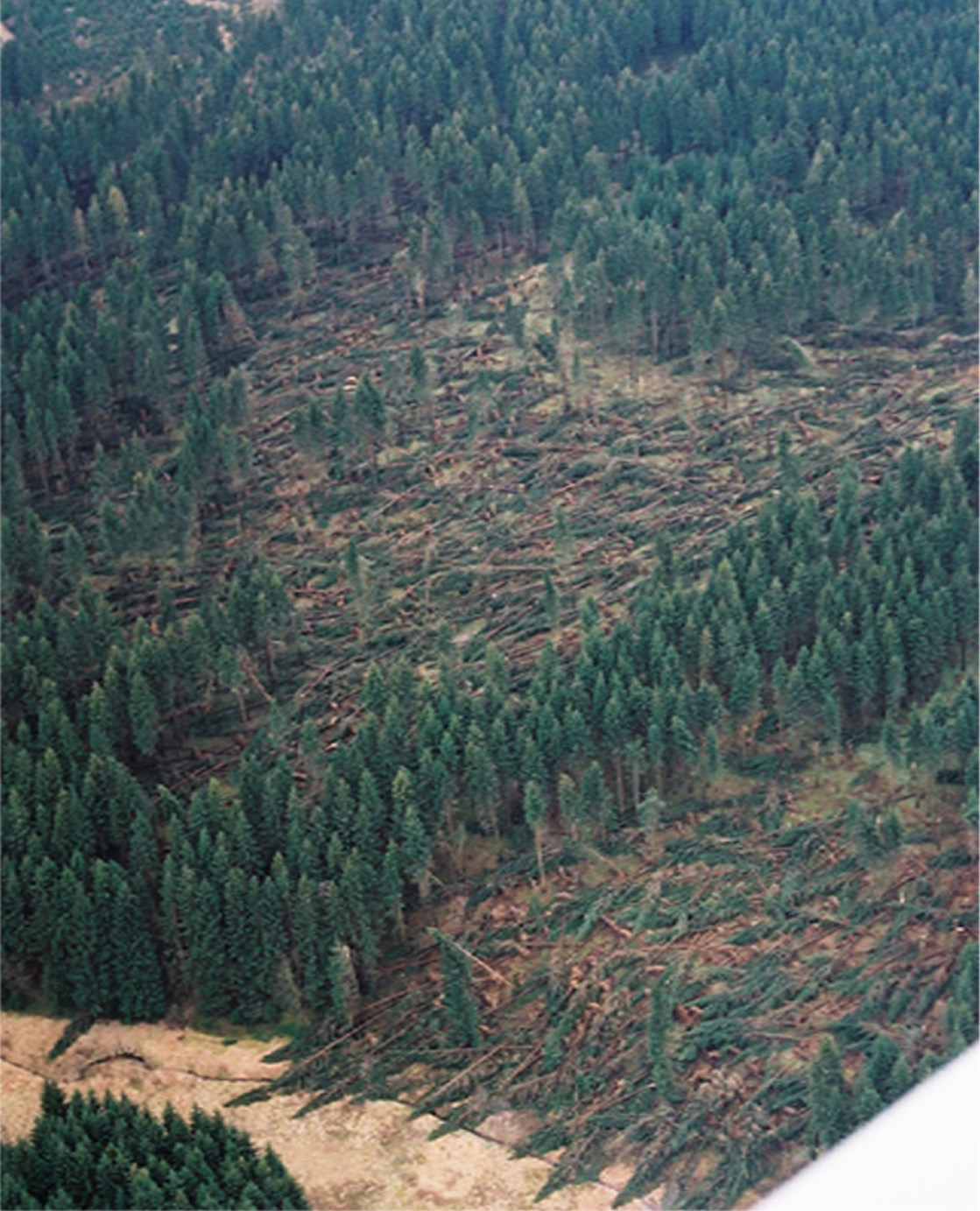 Zerstörter Wald in Erndtebrück-Schameder (Kreis Siegen-Wittgenstein)